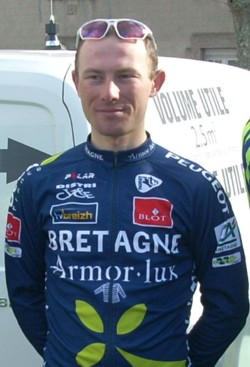 Piotr Zieliński avec ses couleurs de Bretagne Armor-Lux